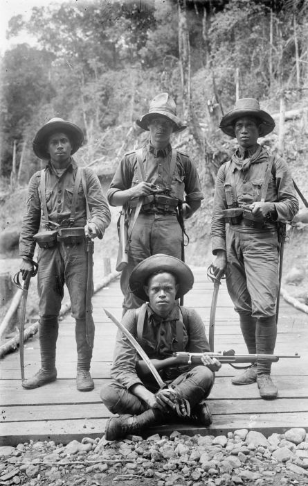 Negatief. Marechaussee op patrouille in Aceh